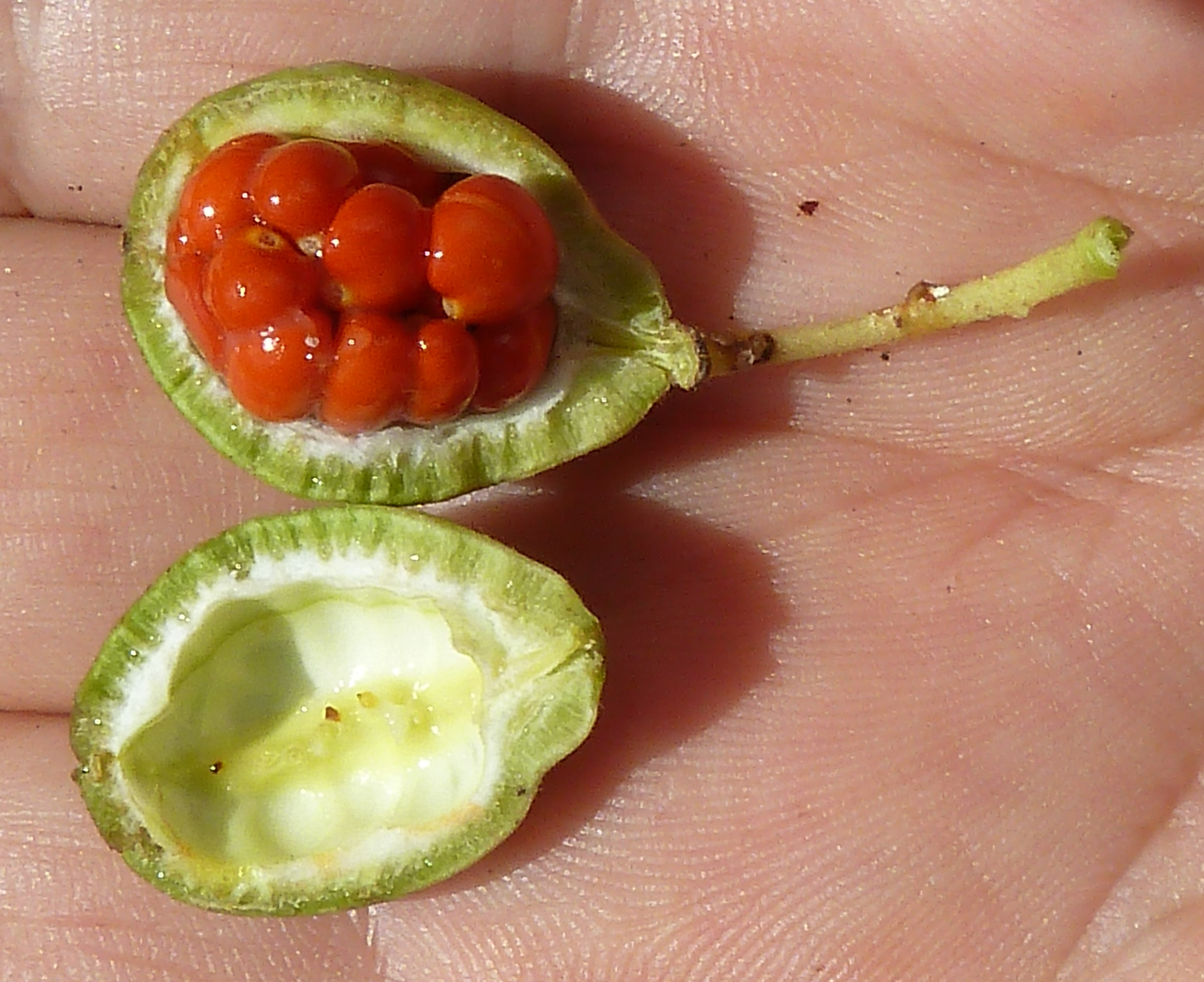 Pittosporum tobira (Azahar de la China, Azarero): fruto artificialmente abierto, con sus simientes pegajosas - Parque de la Huerta, Albatera (Provincia de Alicante, España).